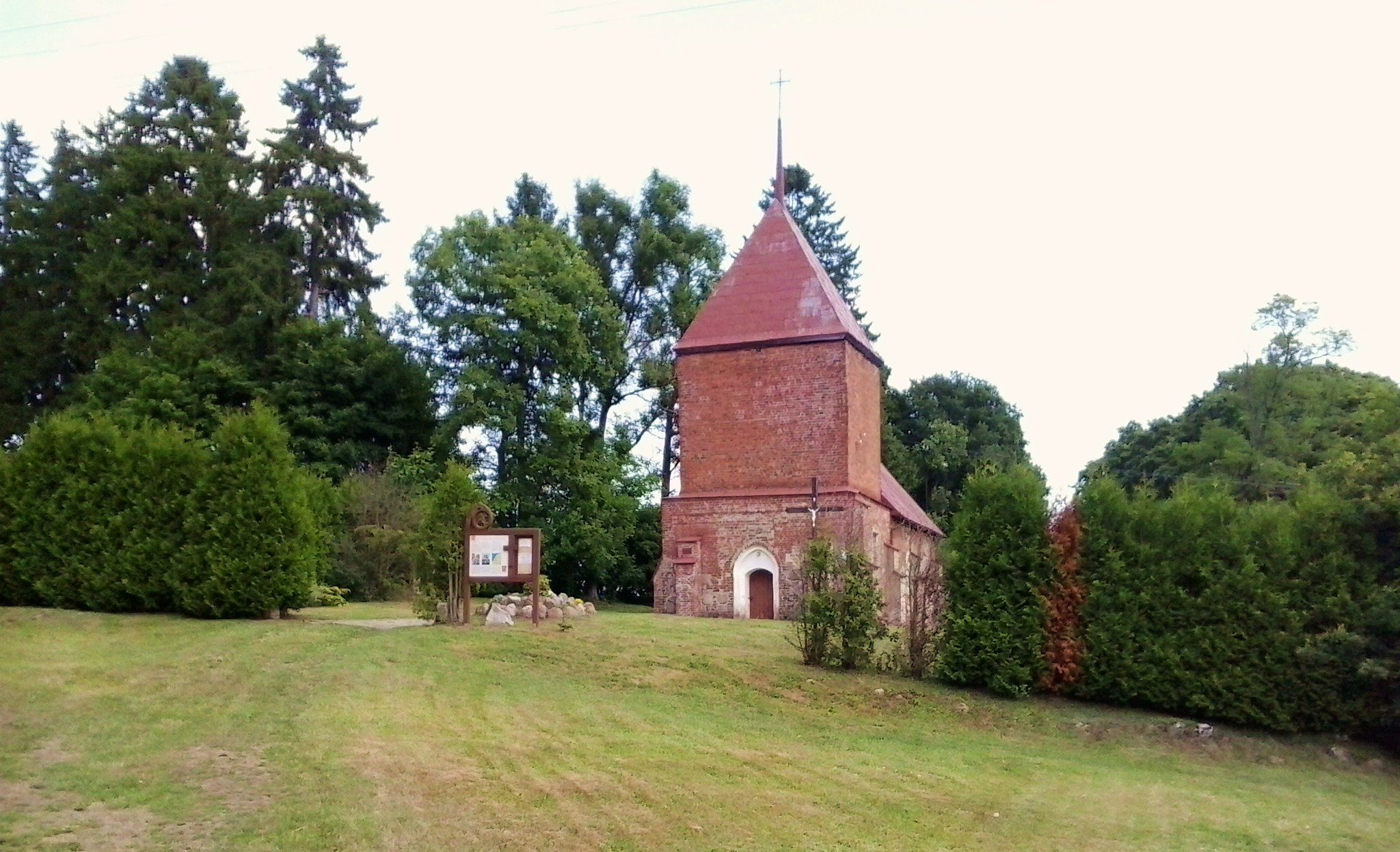 Sierakowo Sławieńskie - kościół.